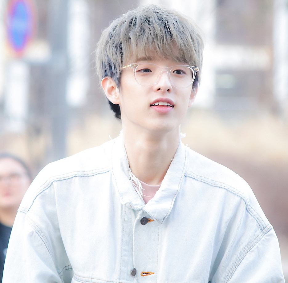 170311 DAY6 음악중심 미니팬미팅 by SinC